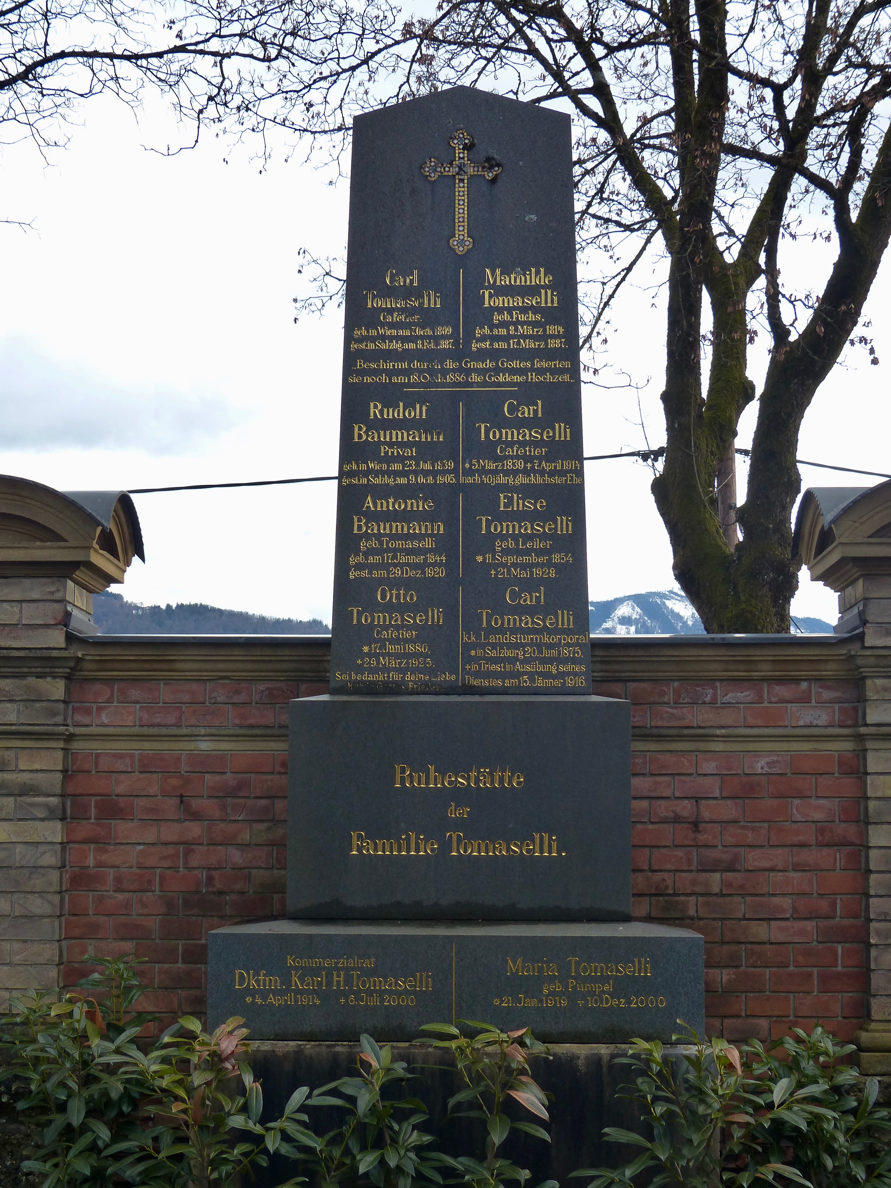 Grabmal Familie Tomselli auf dem Kommunalfriedhof Salzburg